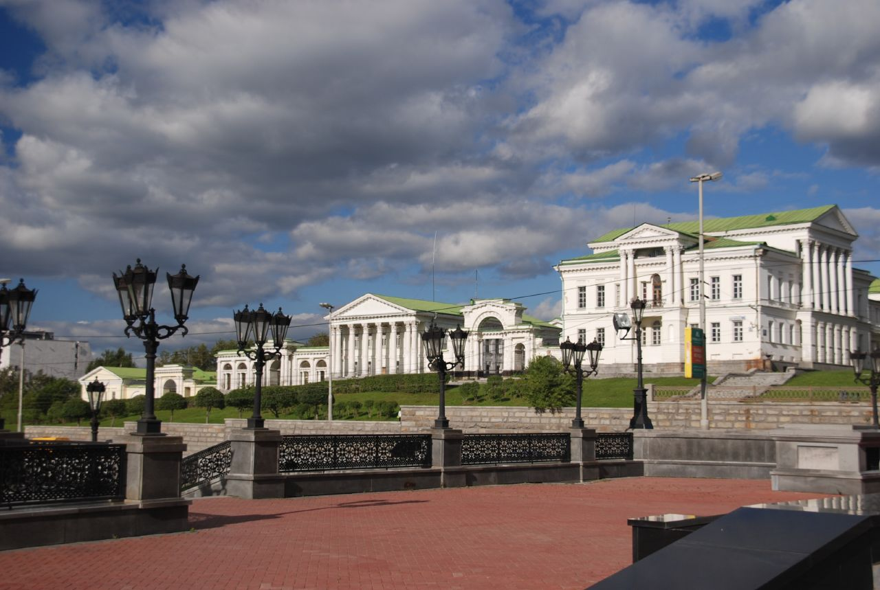 Усадьба Расторгуева-Харитонова, Екатеринбург.